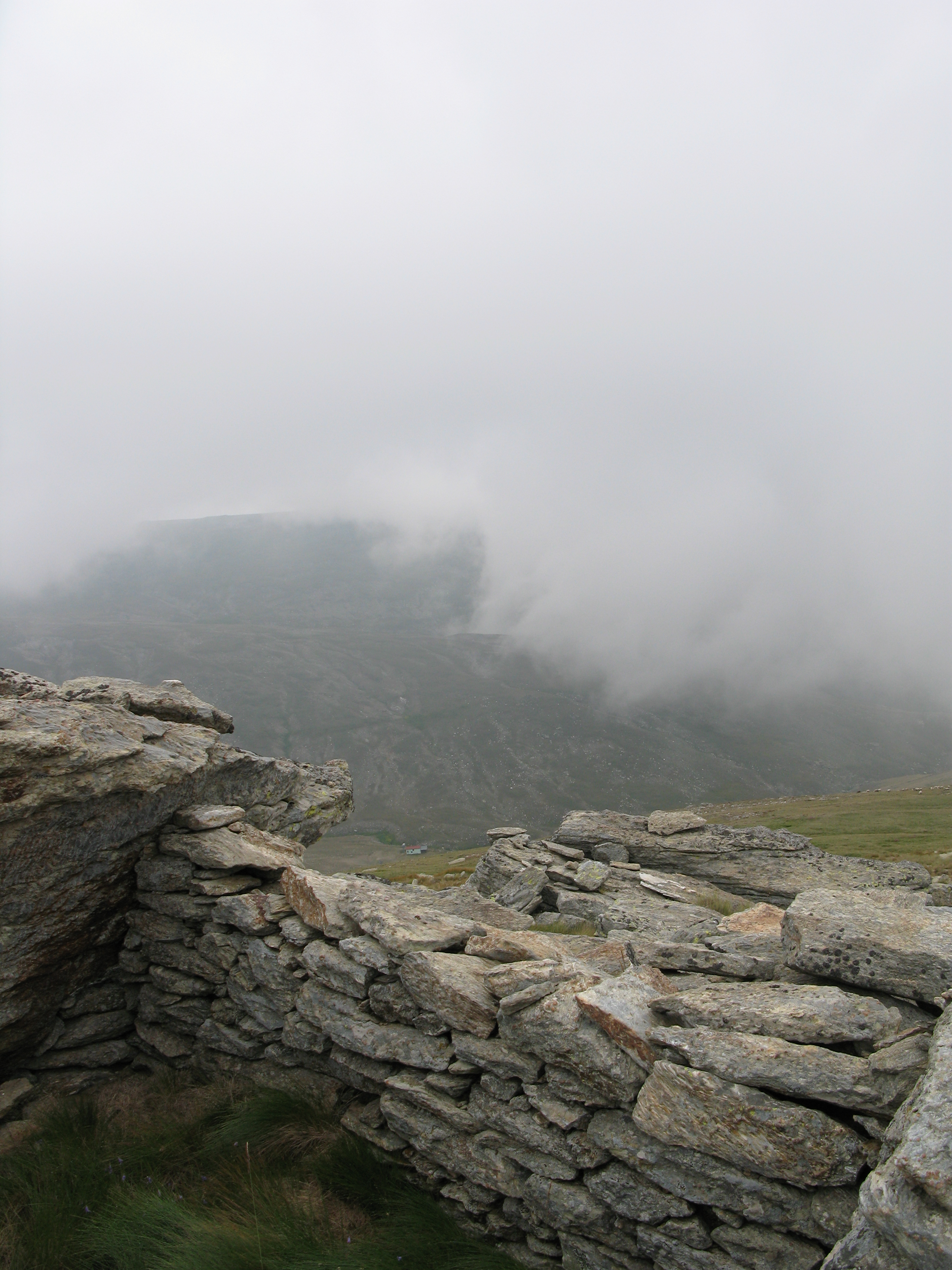 Bugarsko mitralješko gnezdo.